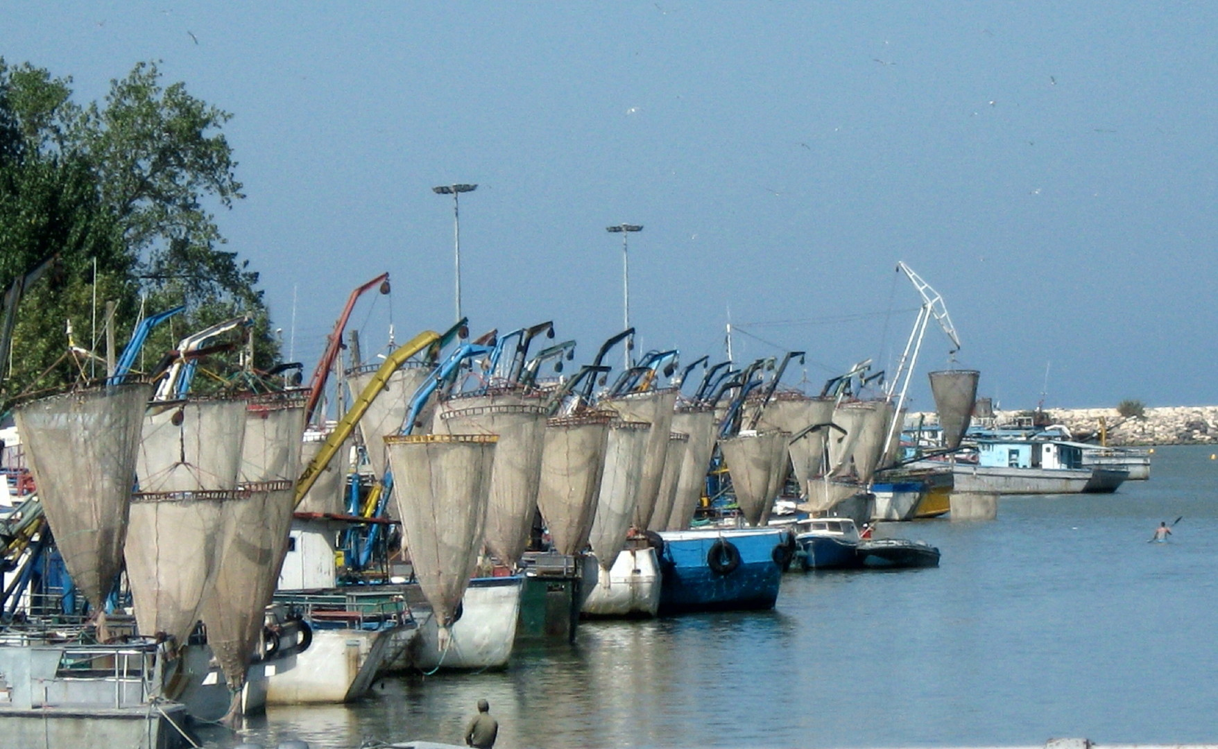 Babolsar-Mazandaran-Iran